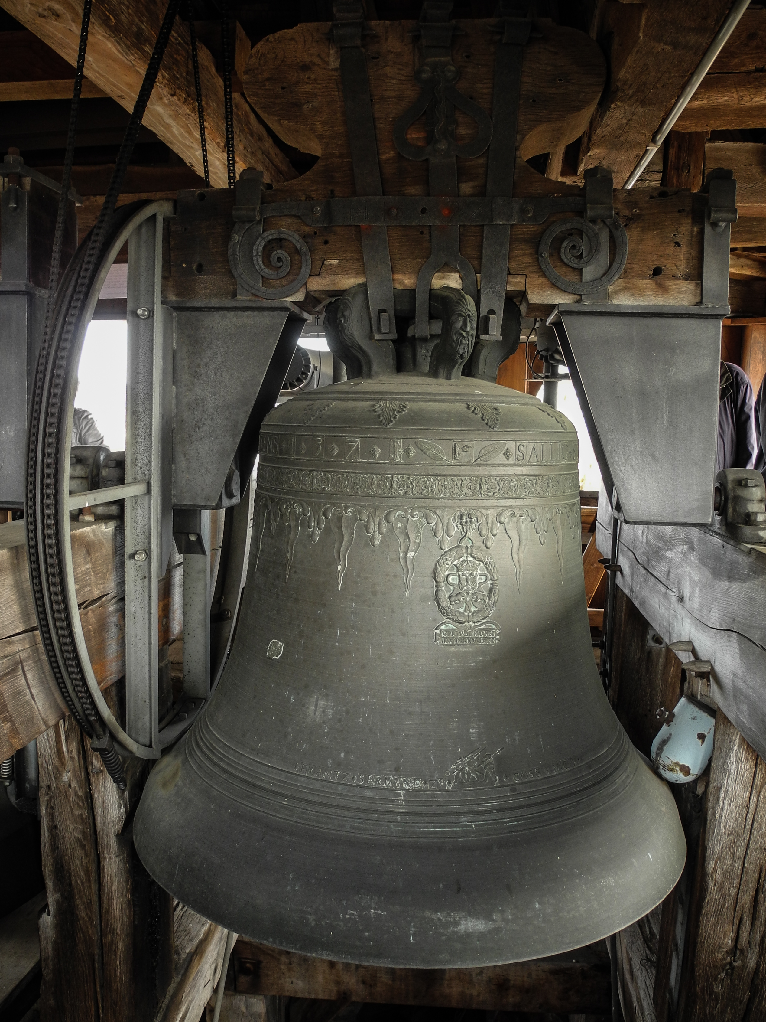 Kirche Jegenstorf, älteste Glocke von 1571